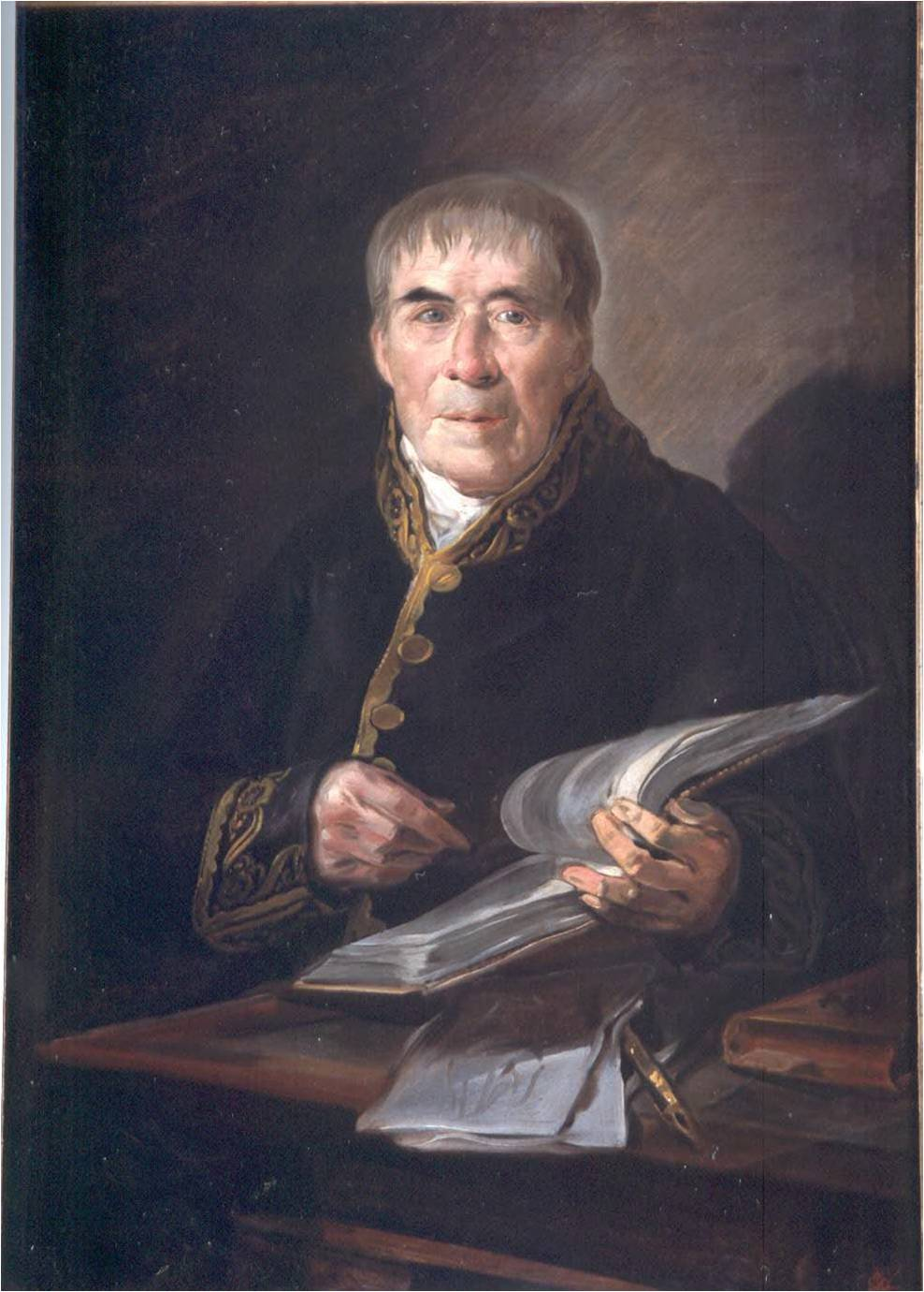 Retrato de Juan Plaza. Representa al artista, vestido con uniforme de académico, ante un escritorio y en disposición de hojear un cuaderno de dibujos. Sobre la mesa aparece un libro, diversas laminas, y algunos instrumentos de dibujos como una pluma.